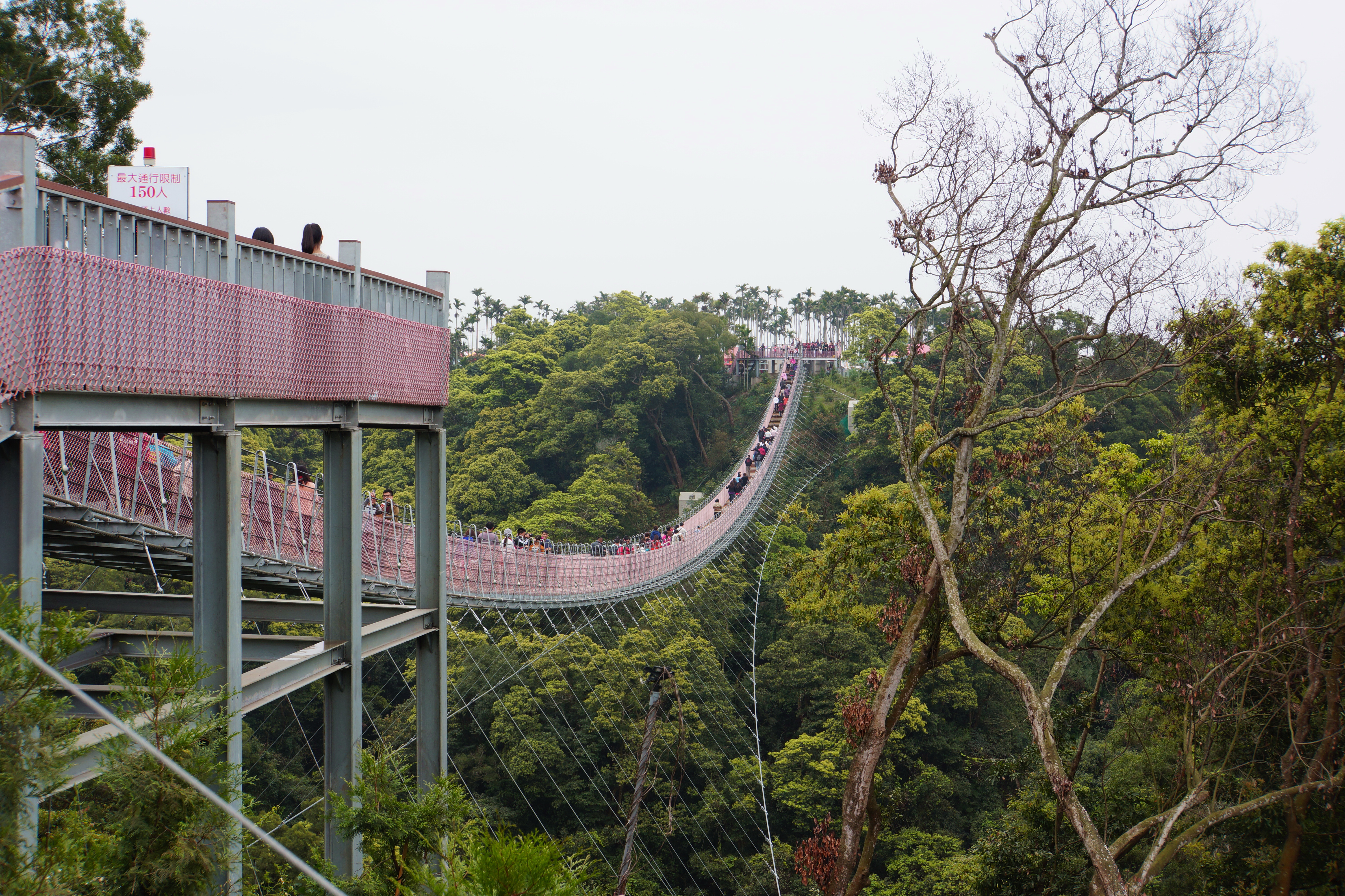 天空之橋 Sky Bridge